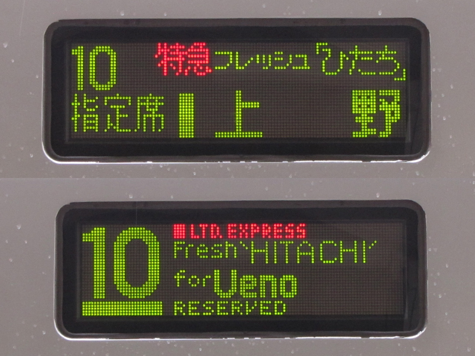 JR東日本 E653系車両 側面行先表示器（特急 フレッシュひたち号上野行き ） (モハE652-20)